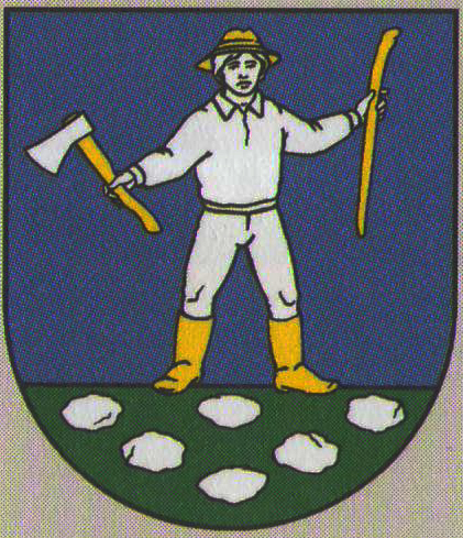 Erb obce Mlynárovce (HR: M-165/2004): V modrom štíte na zelenej, šiestimi striebornými kameňmi preloženej pažiti je striebroodetý muž v zlatom klobúku a zlatých čižmách v upaženej pravici so striebornou sekerou na zlatom porisku, v upaženej ľavici so zlatou palicou. Autormi erbu sú Sergej Pančák a Leon Sokolovský.